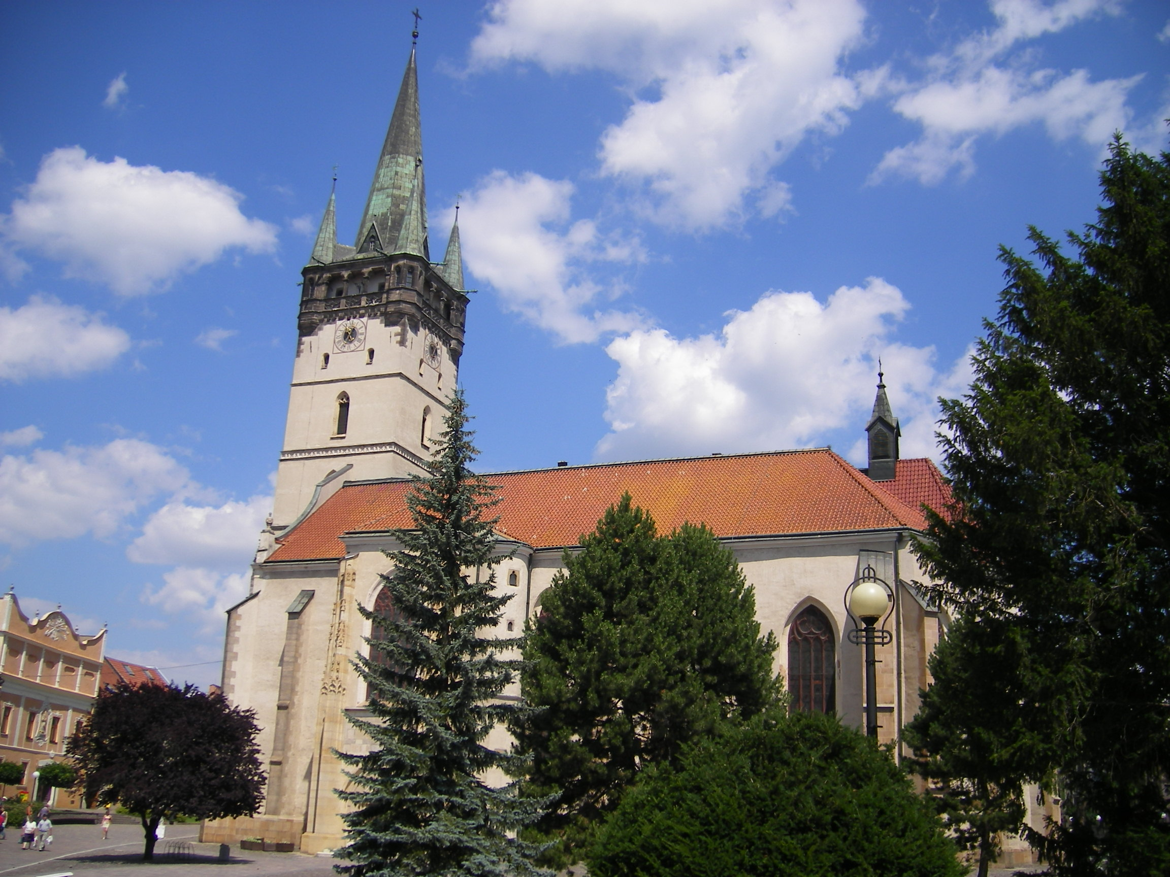 Prešov, St. Nicolaus Dome